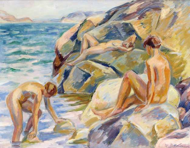 Batherslabel QS:Lde,"Badende"label QS:Len,"Bathers"